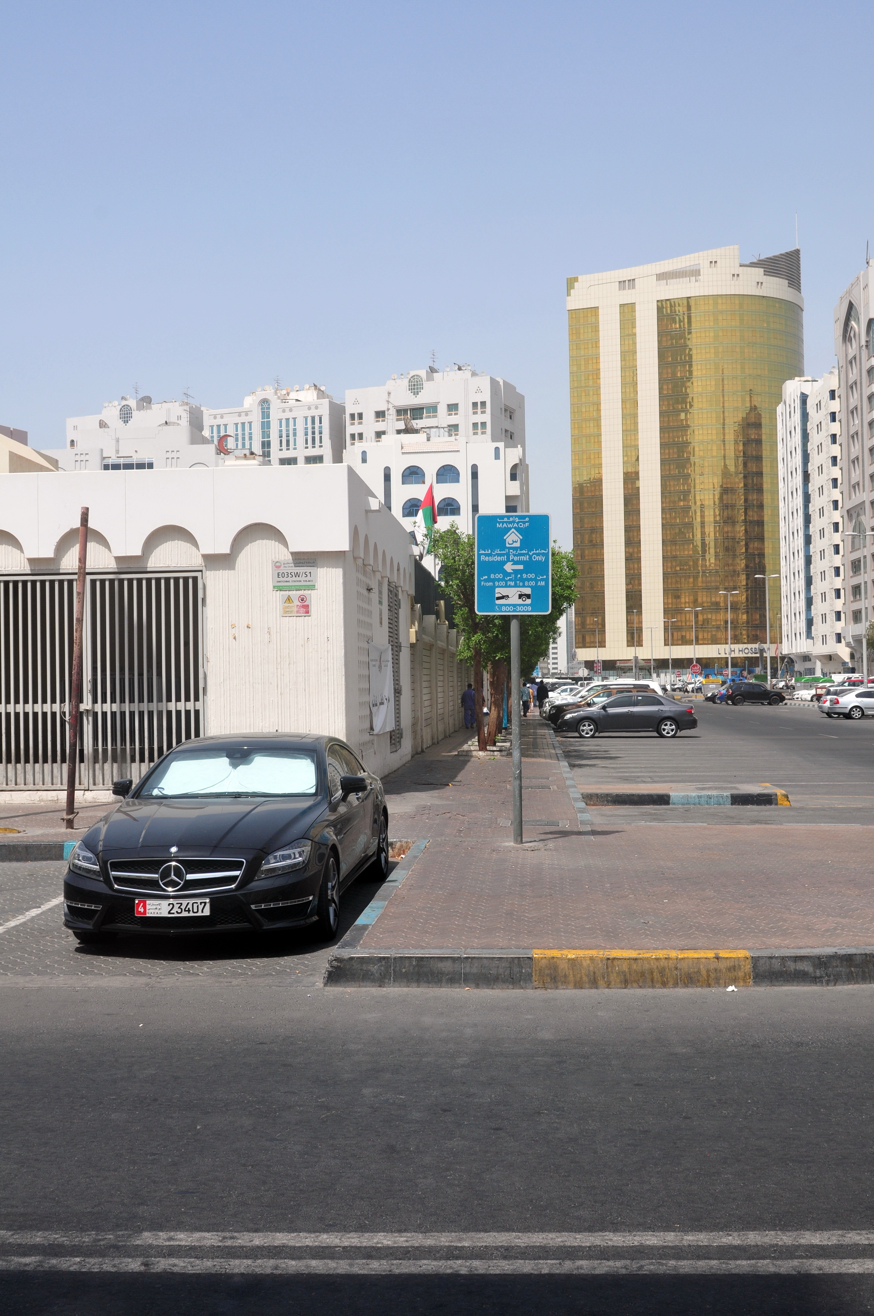 travel to Wikimania 2013: Abu Dhabi